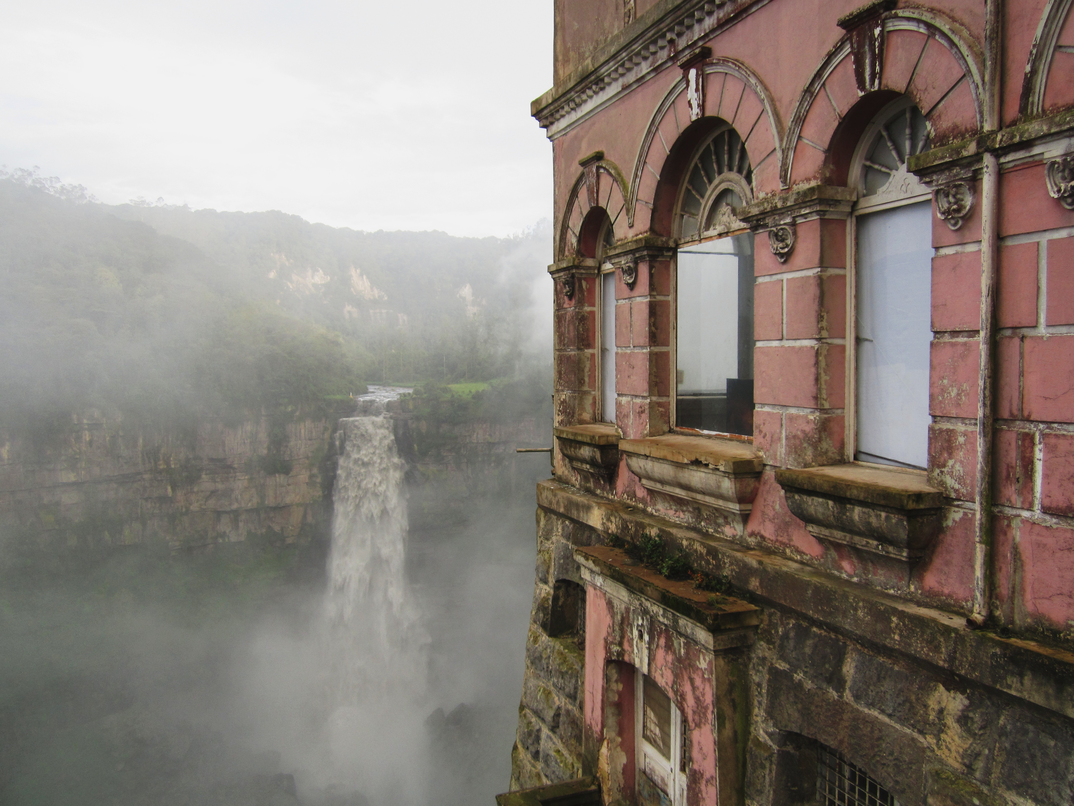 Hotel y catarata-salto del Tequendama, en las cercanías de Bogotá, Colombia.